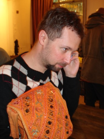 Bartosz Żurawiecki